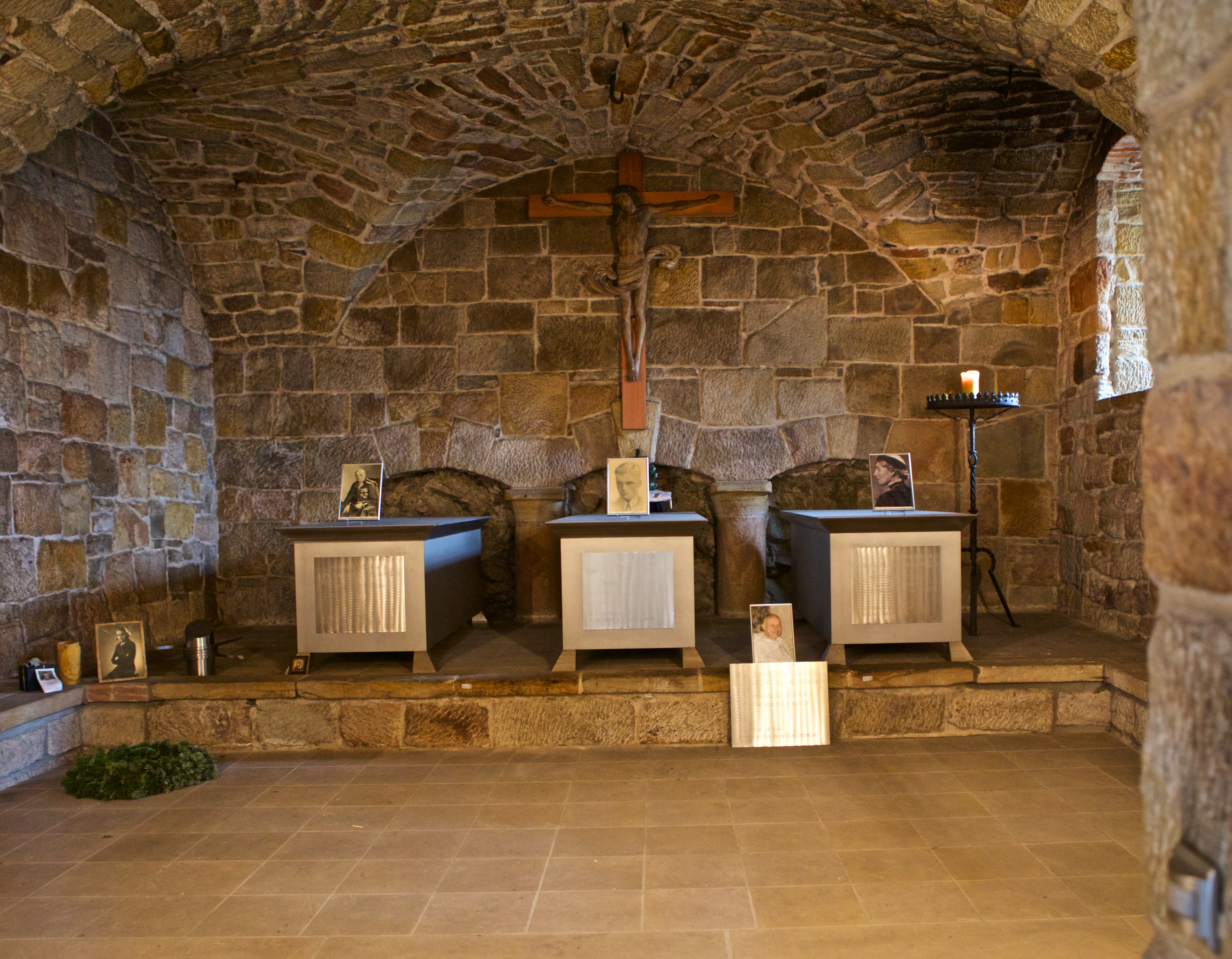 Veste Heldburg, Krypta